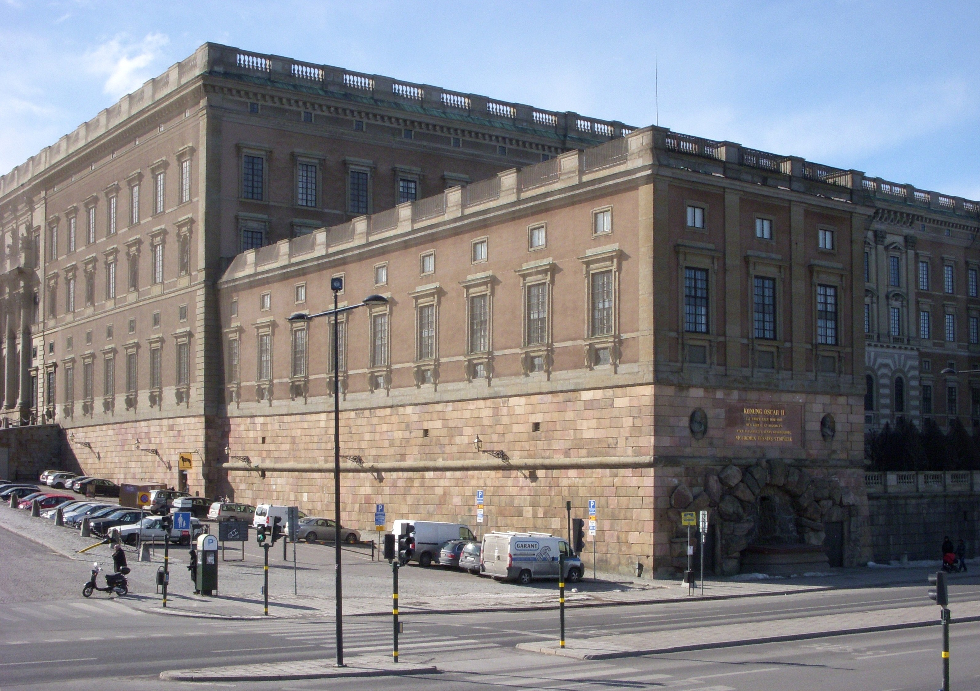 Stockholms slott södra flygeln och Slottsbacken